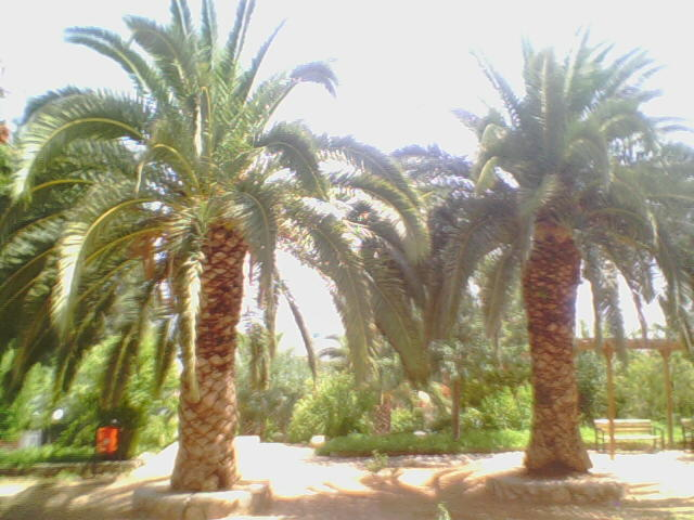 Bu resmi cep telefonu kameramla çektim.